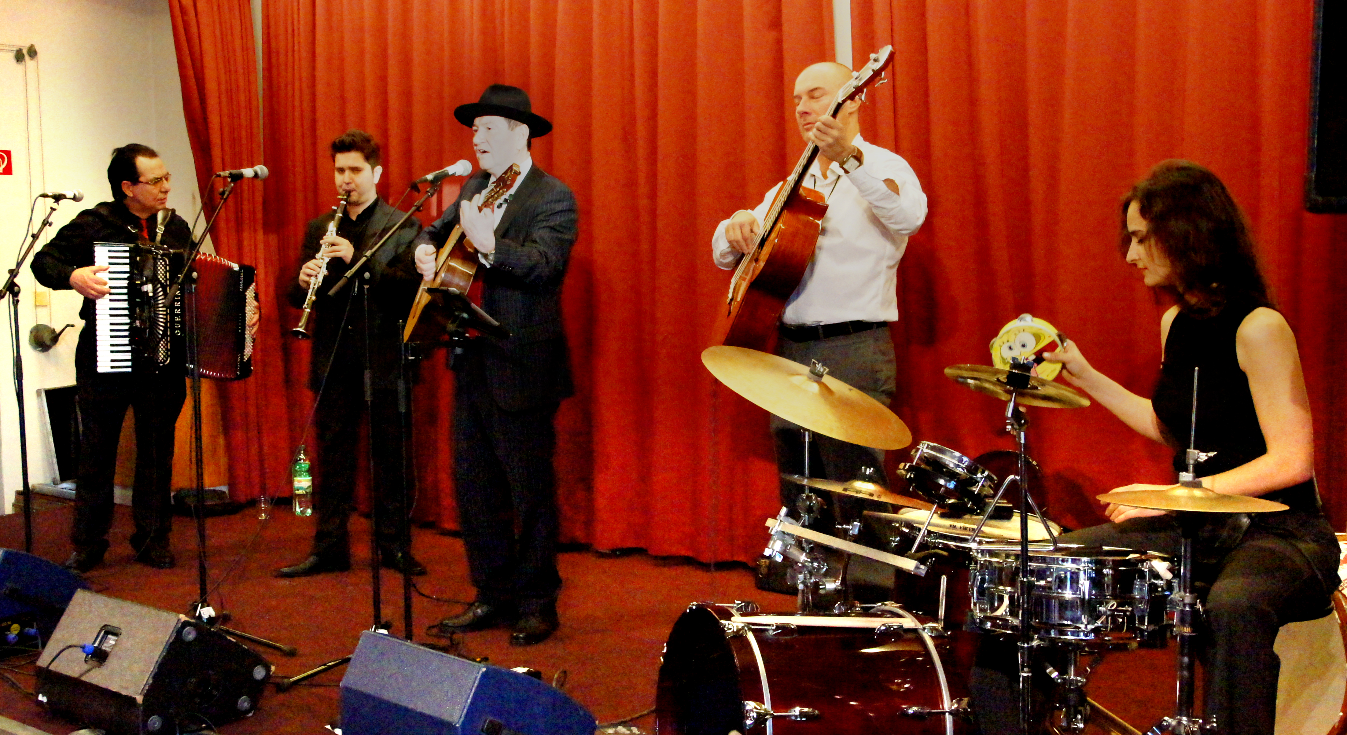 Vienna 2013-04-08 Wiener Tschuschenkapelle 062